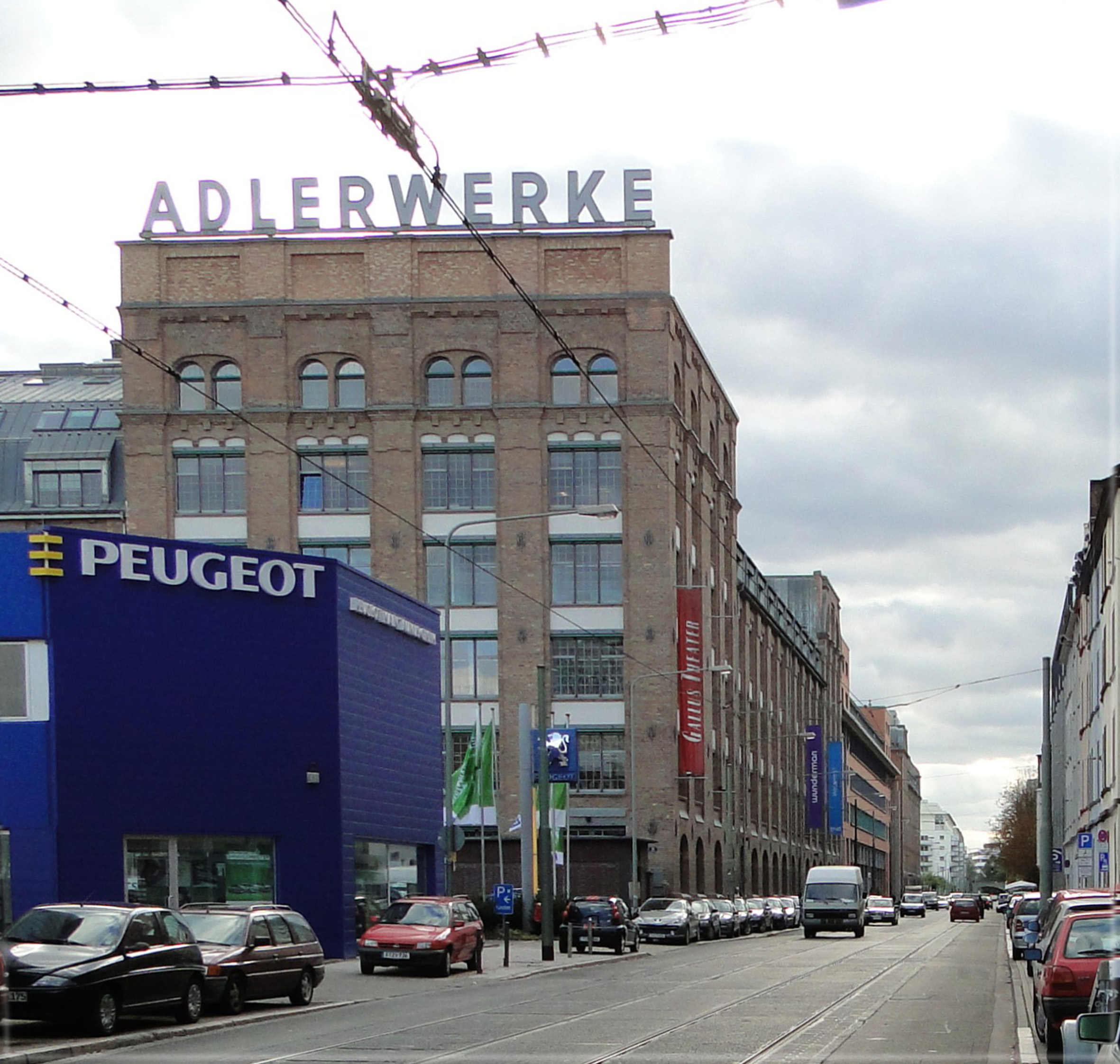 Fabrikanlage der früheren Adlerwerke Frankfurt a.M.